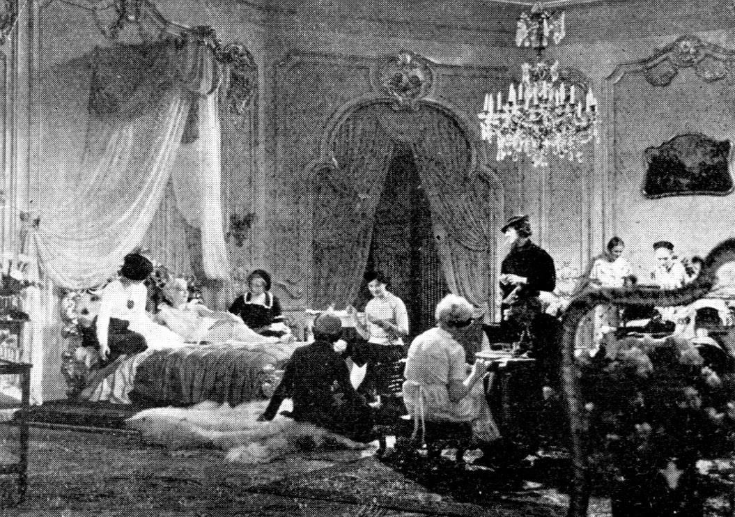 Ballerine regia di Gustav Machaty produz A.F.I. Tirrenia (It), 1936 - foto scena